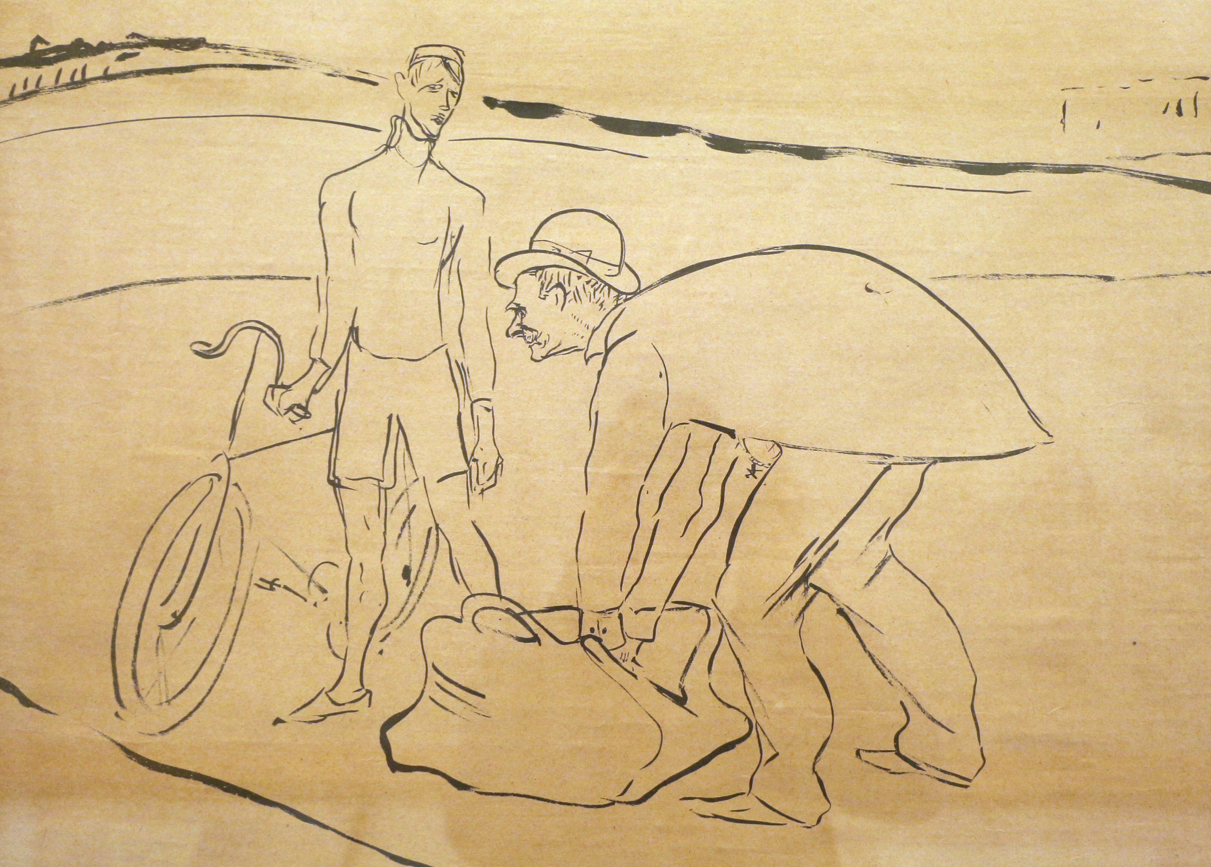 Villa Reale di Milano. The cylist Jimmy Michael and his coach Choppy Warburton (left scene) This is a photo of a monument which is part of cultural heritage of Italy.